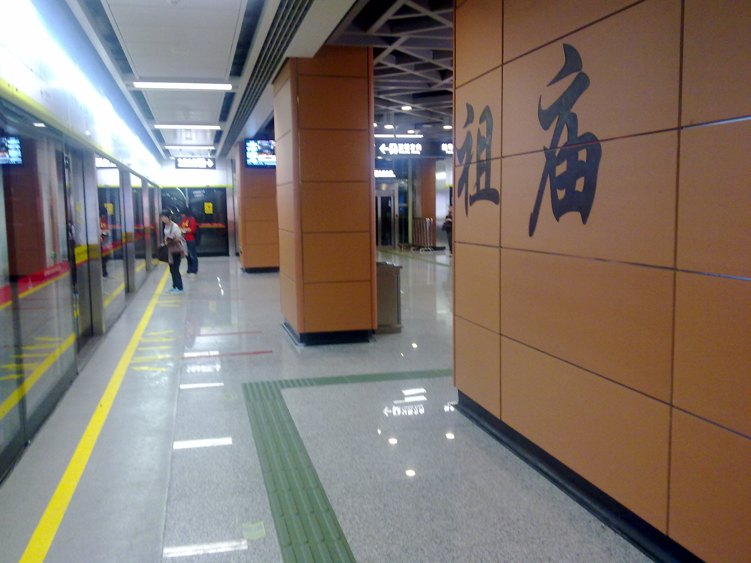 廣佛地鐵祖廟站站台